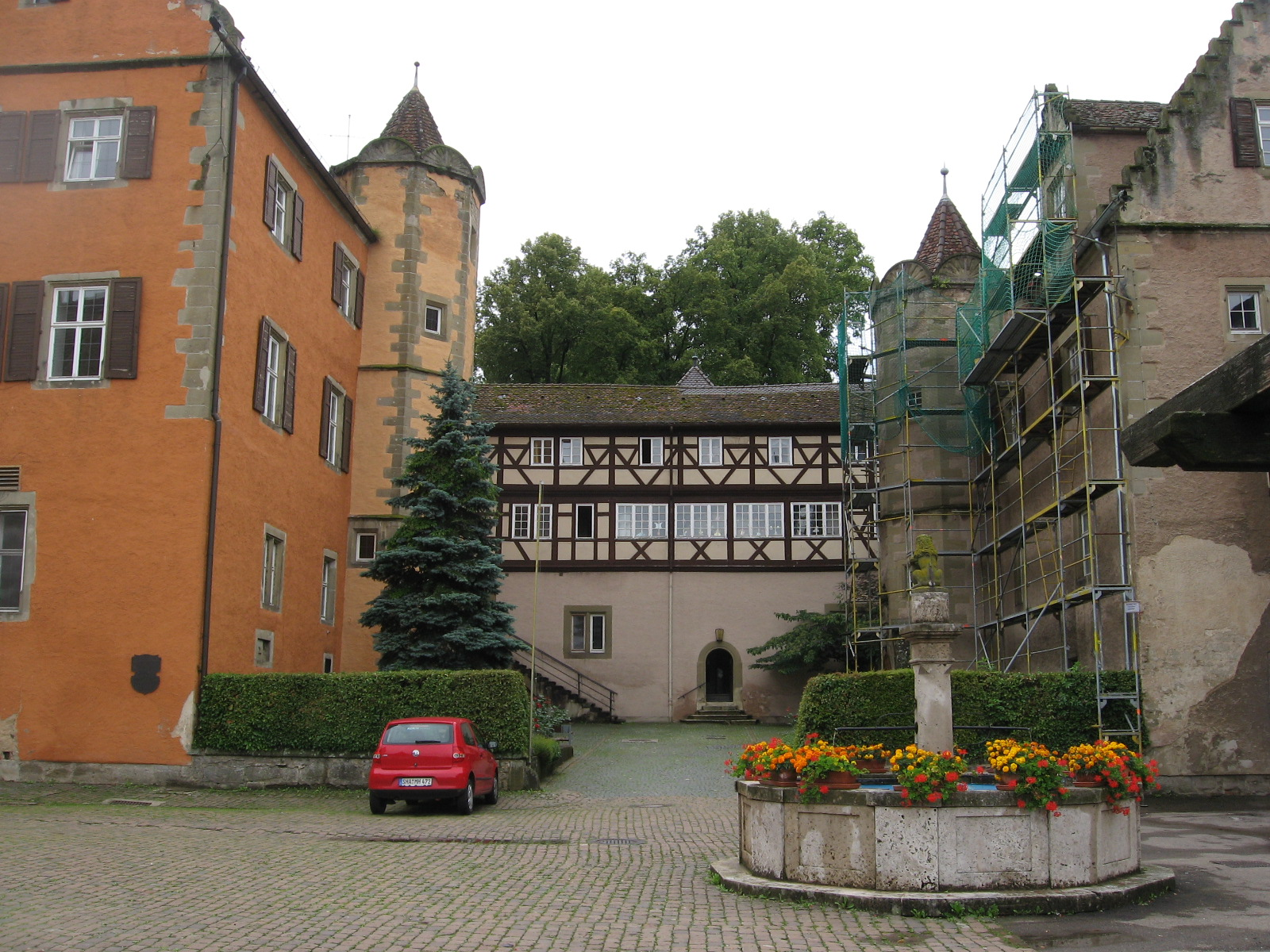 Schloss Obersontheim, Blick nach SW auf den inneren Hof.